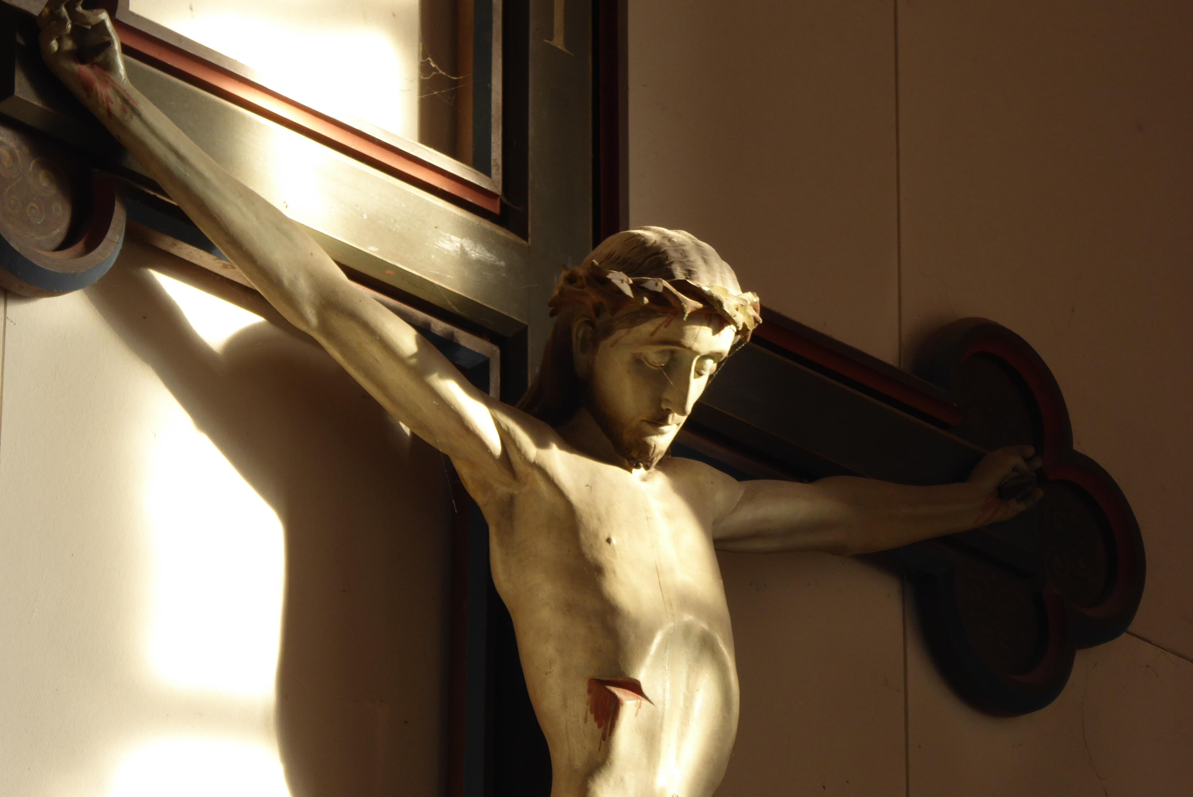 Spätgotisches Triumphkreuz in der Kirche von Reinhausen, Gemeinde Gleichen, Südniedersachsen